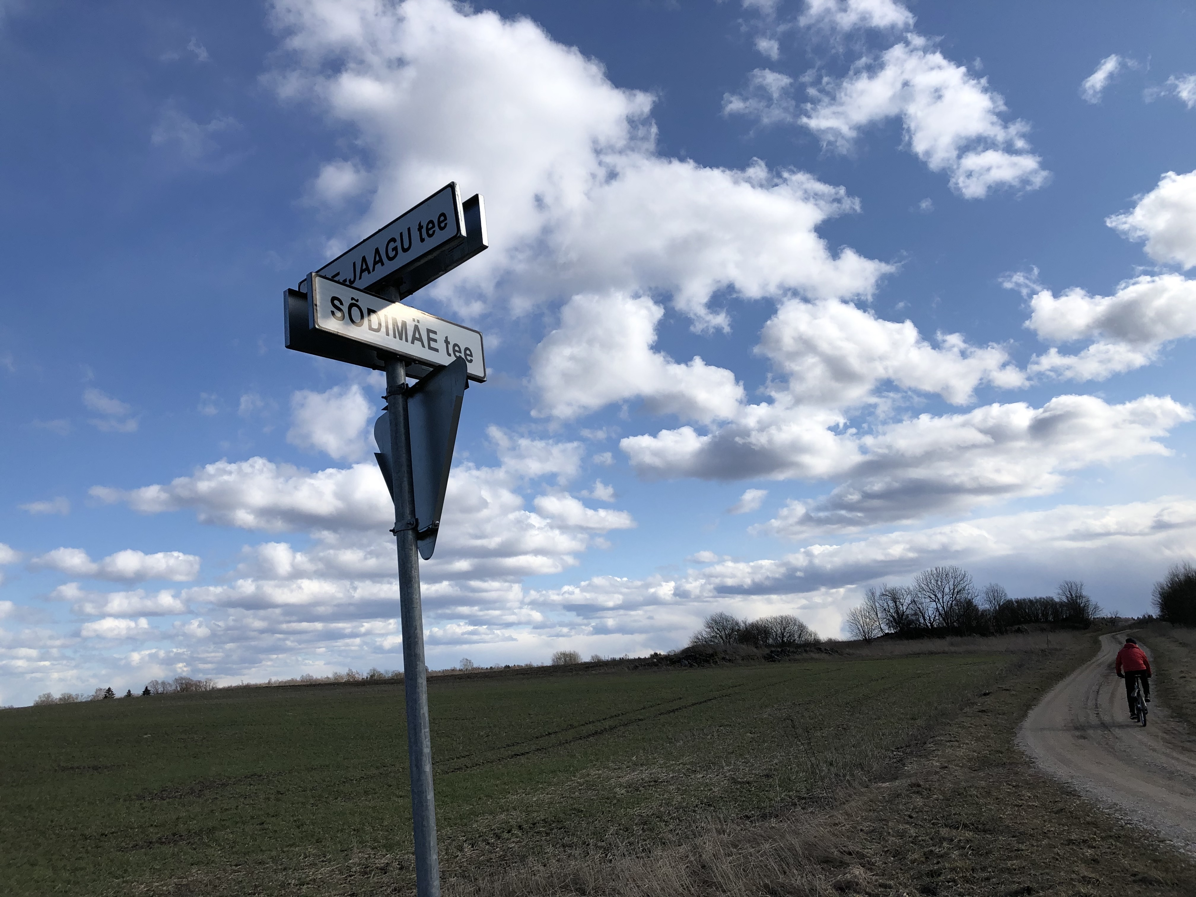 Liiklusmärk